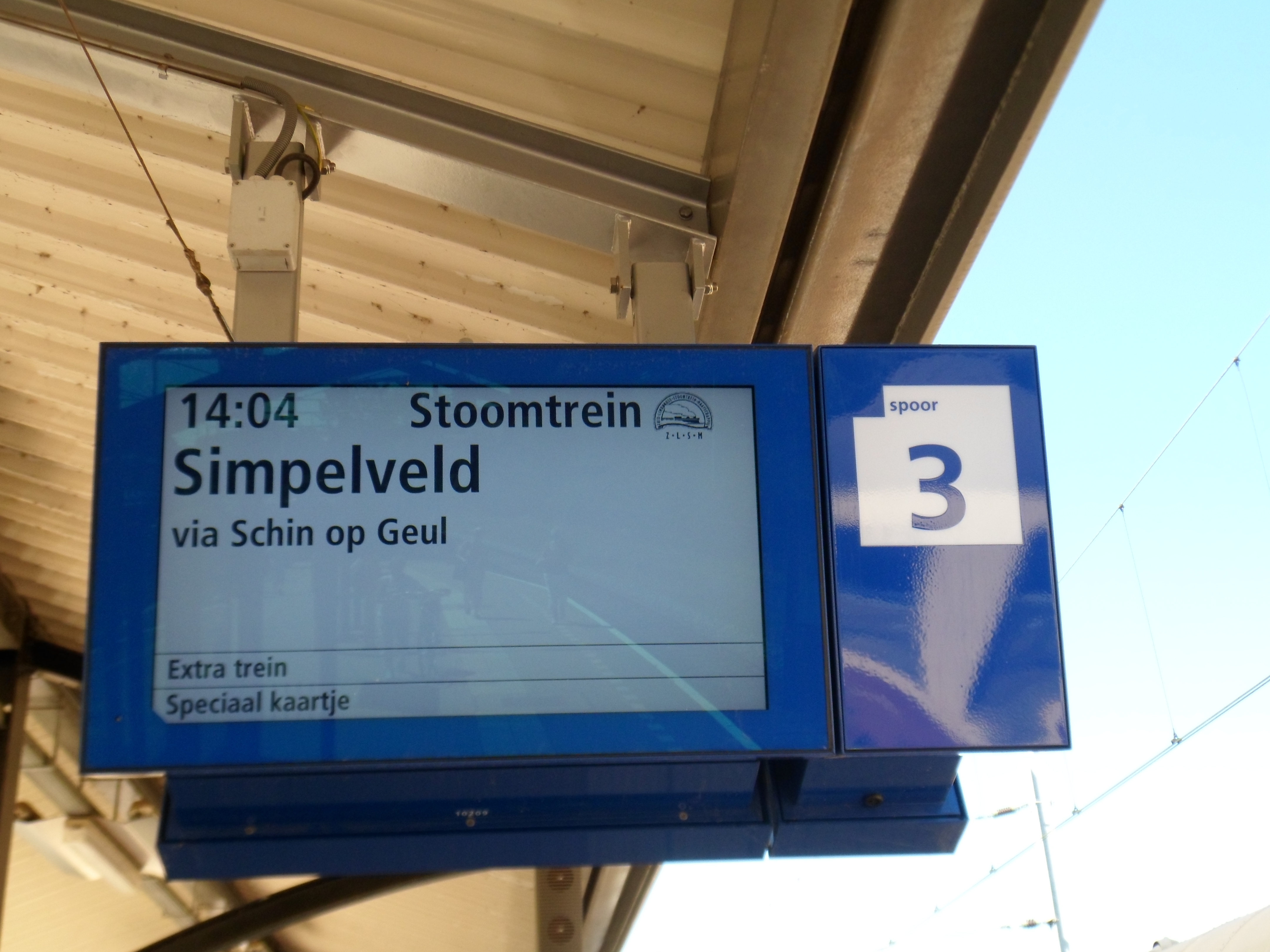 Vertrekbord stoomtrein ZLSM te station Valkenburg